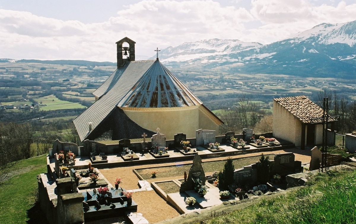 L'église et le cimetière de Buissard (Hautes-Alpes), au hameau de Rissents. Au fond, la montagne de Charance.